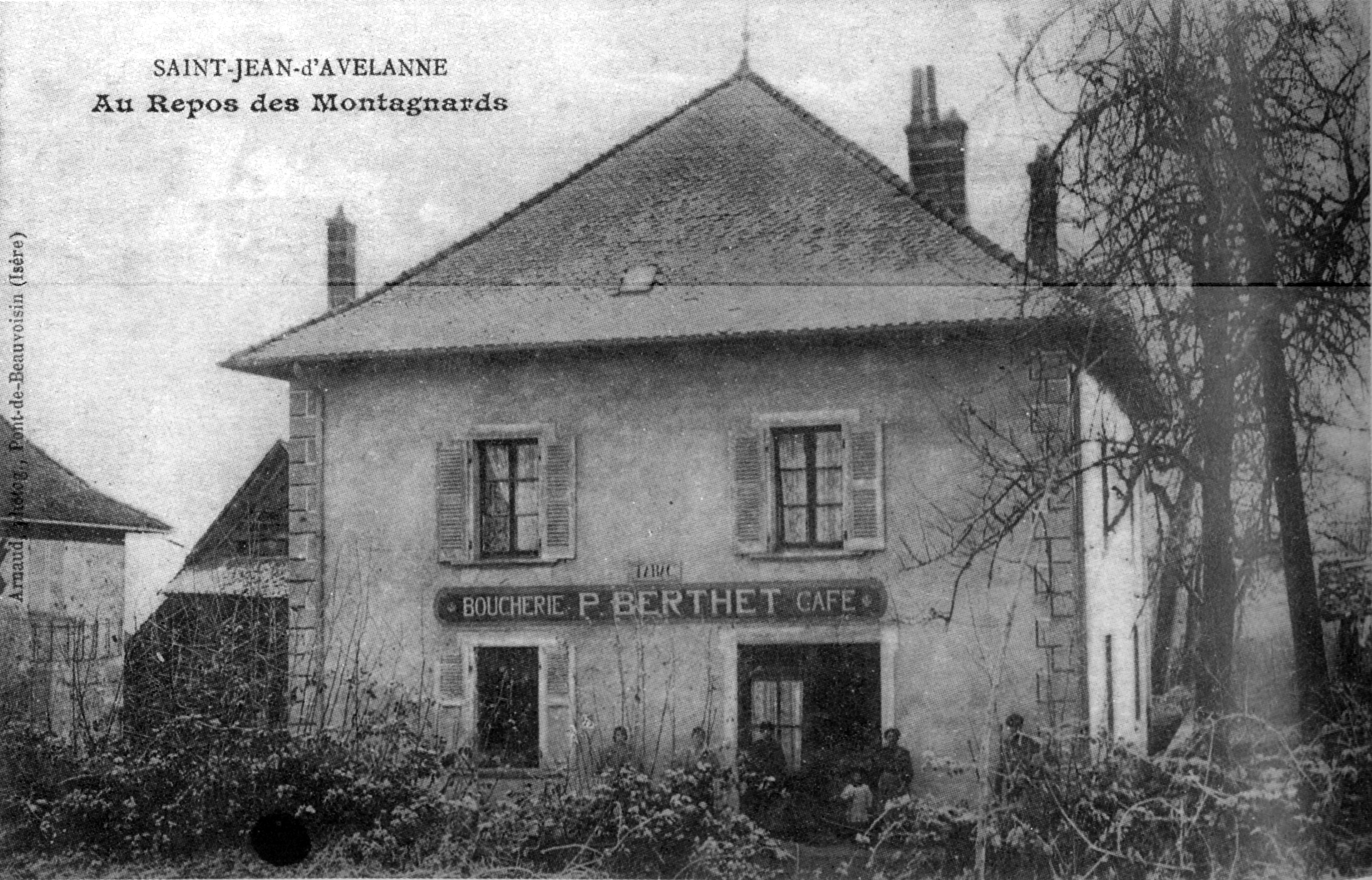 Saint-Jean-d'Avelanne, en 1912